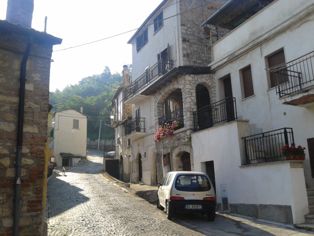 Via Umbrone a Pescina